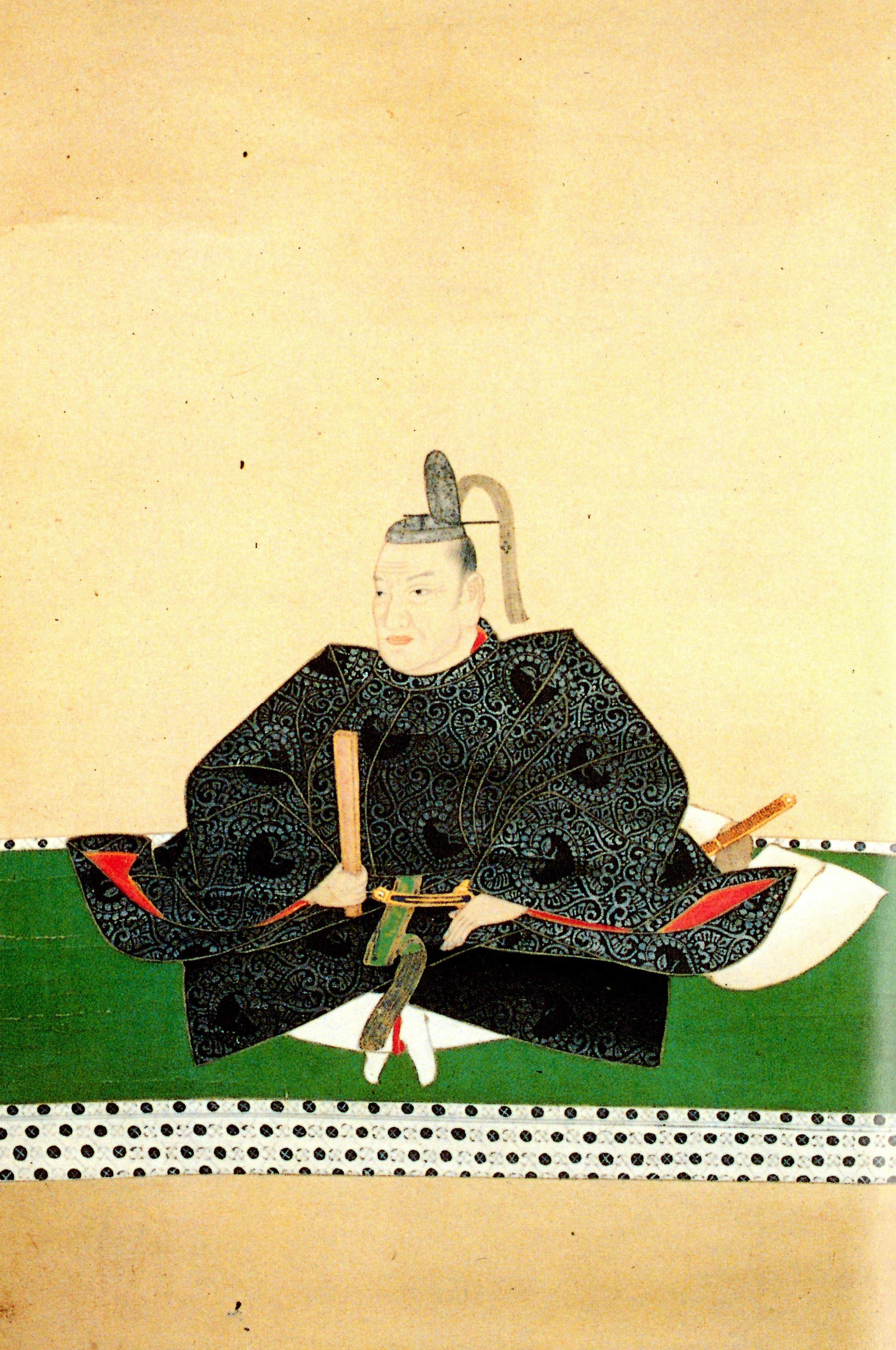 内藤政長の肖像。